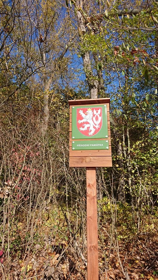 fotka přírodní památky Jiřina - lužní les